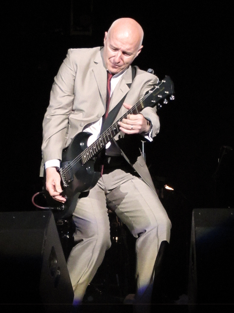 Midge Ure